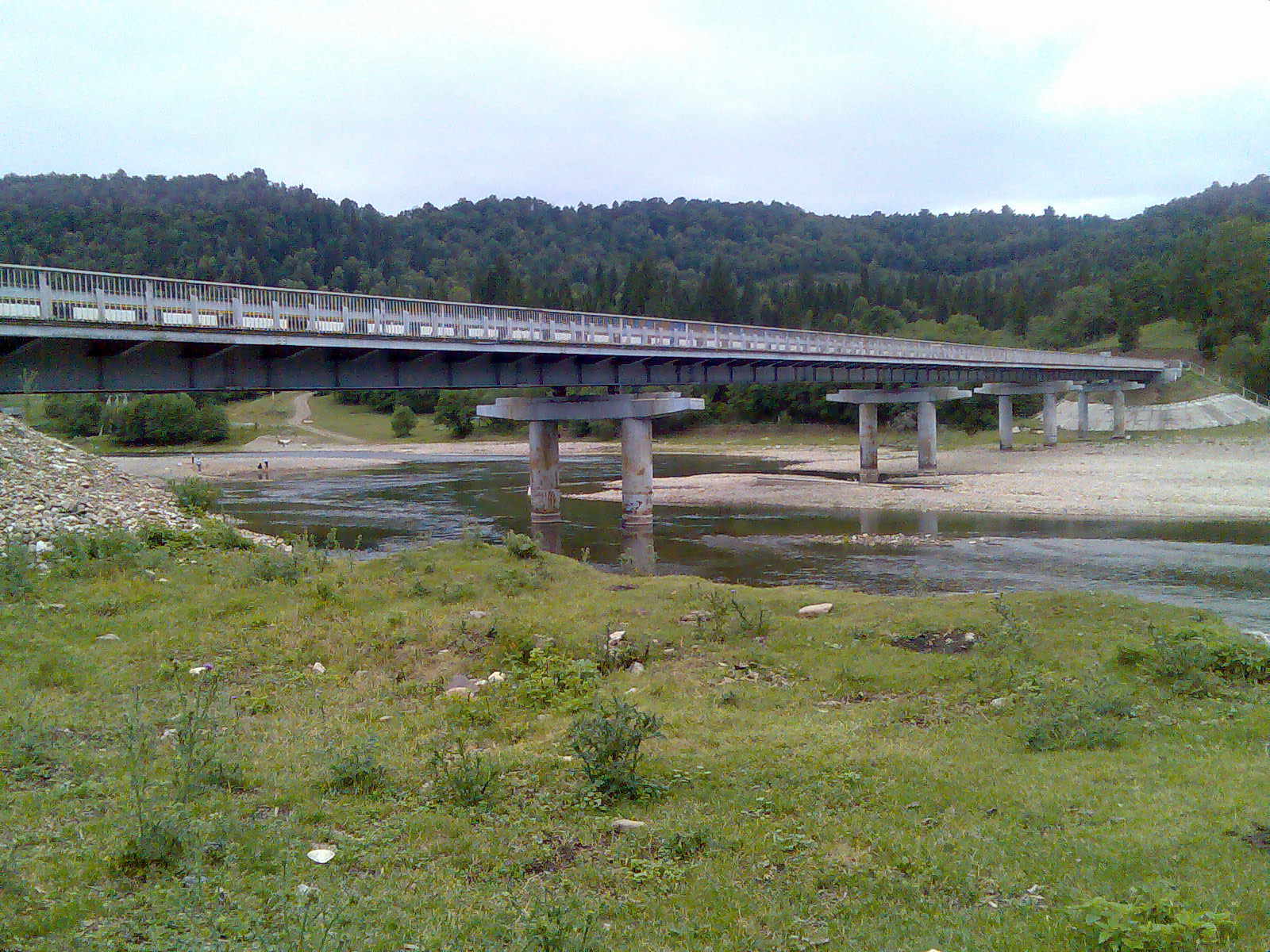 Мост через Зилим